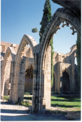 Bellapais Abbey.